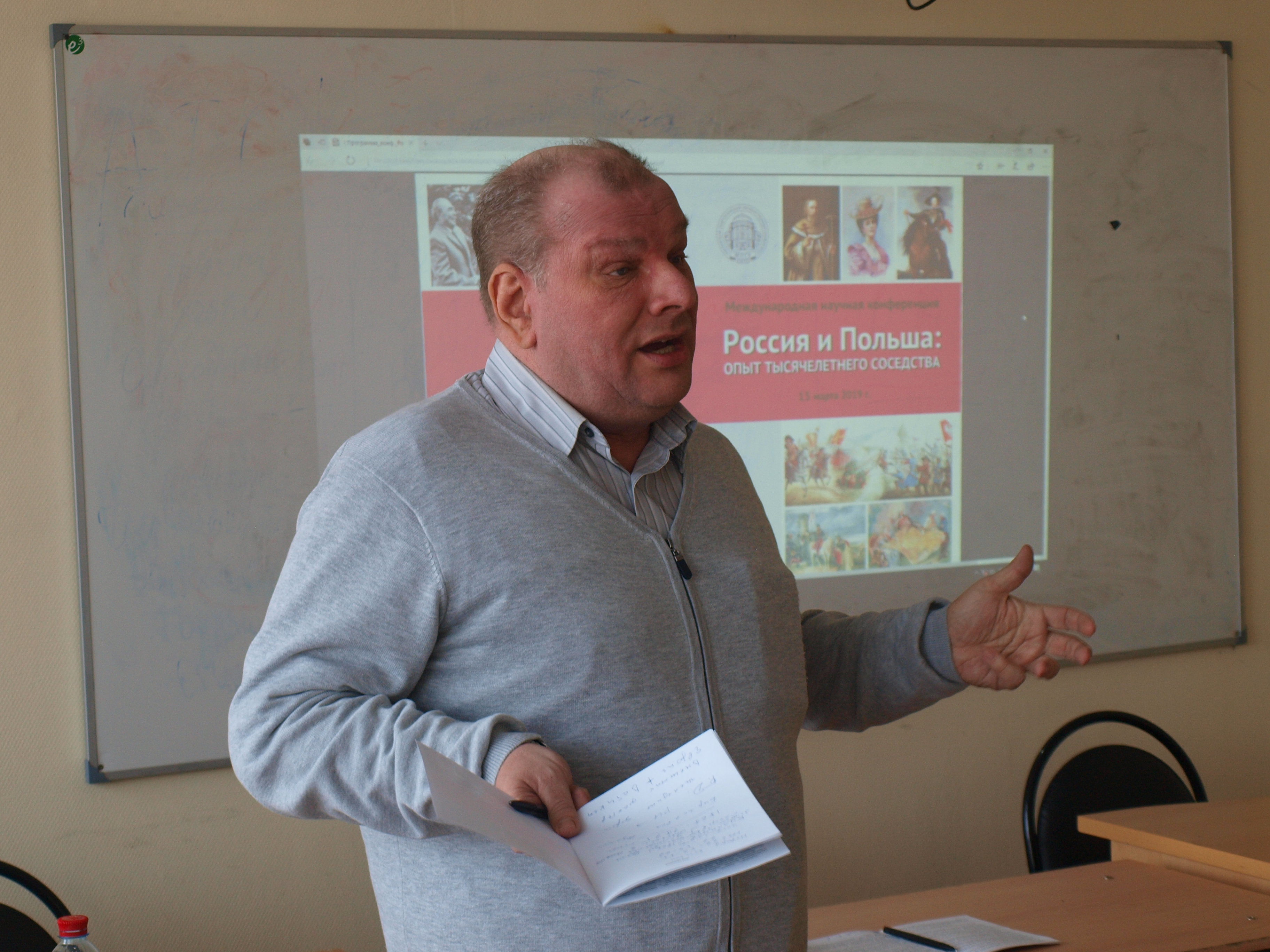 Выступление на международной конференции. МПГУ